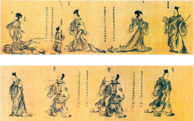 東晉顧愷之所繪列女仁智圖。